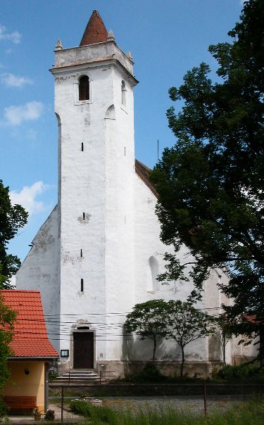 Kostel Nanebevzetí Panny Marie v obci Stálky, okres Znojmo.